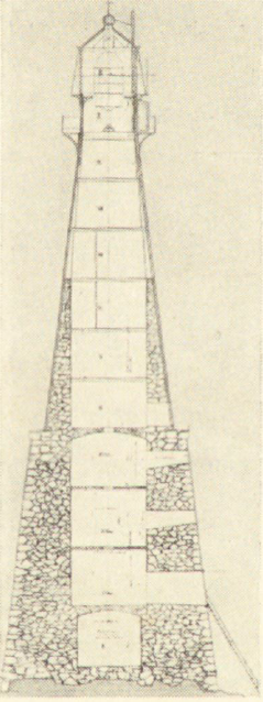 Architectural drawing of the lighthouse at Grip built in 1888 on an islet on the Norwegian coast. Møre og Romsdal, Norway.